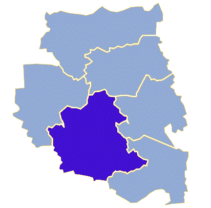 Powiat międzyrzecki, gmina Międzyrzecz